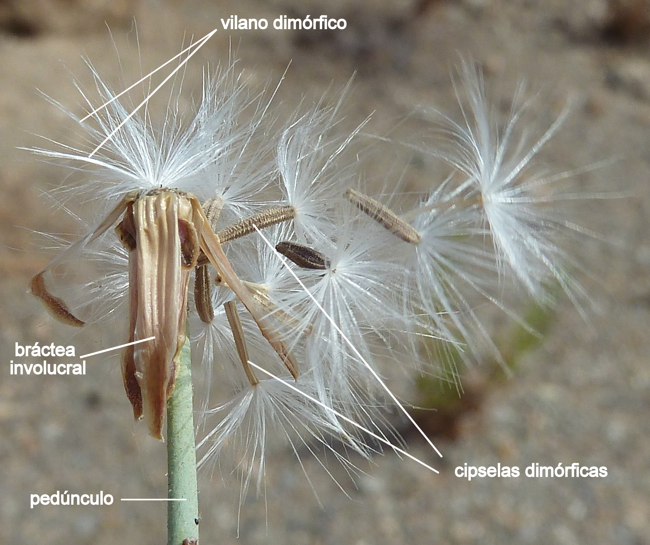 Launaea arborescens (Aulaga): Capítulo en fructificación con cipselas dimórficas soltadas - Circunvalación Norte, Águilas (Murcia, España).